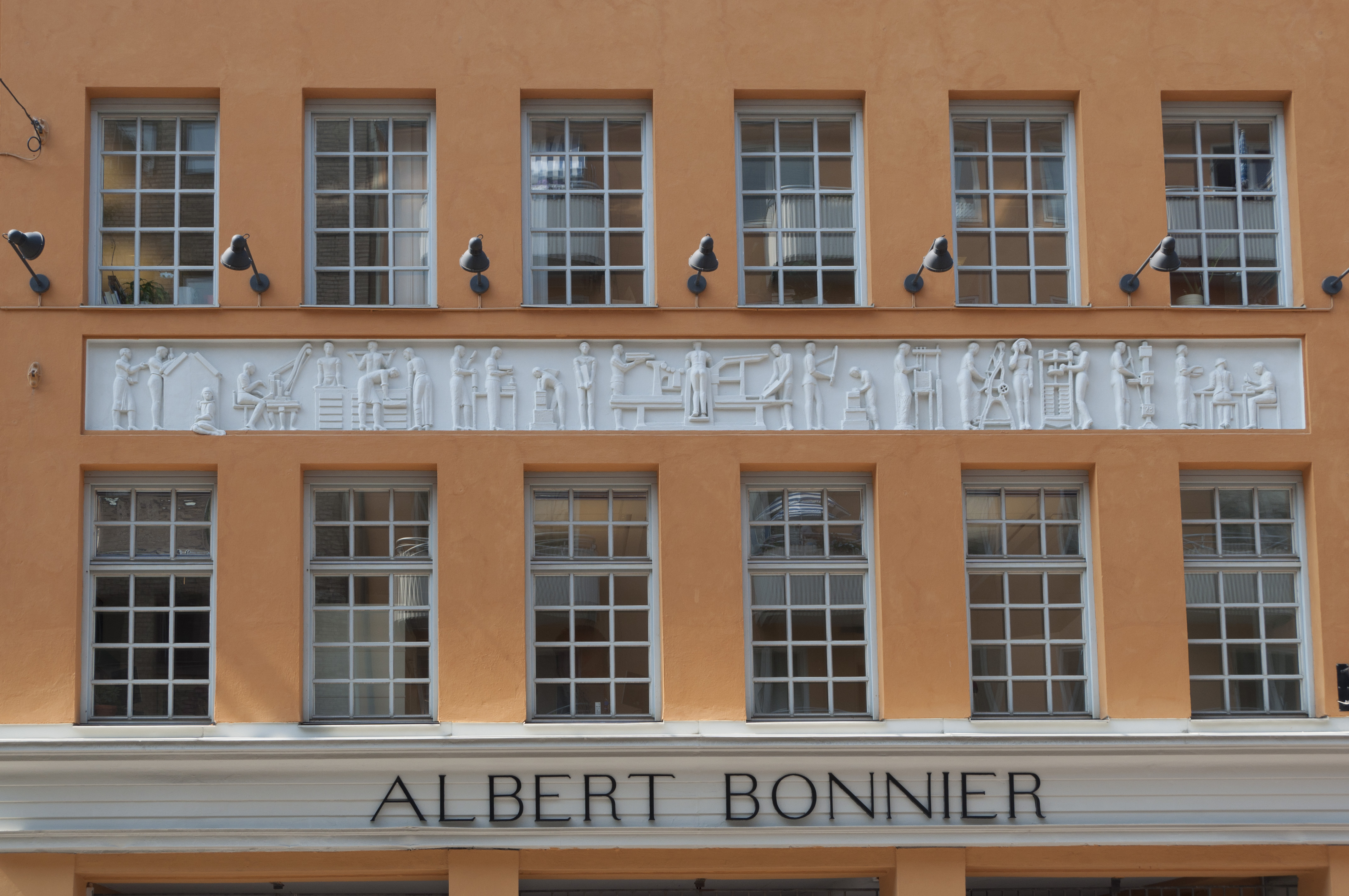 Moraset 22, Luntmakargatan 39-45. Byggnadsår Byggnadsår 1927-29, arkitekt Mauritz Dahlberg, fasadutforming av Rolf Bolin, byggherre Albert Bonnier, byggmästare Olle Engkvist. Fris av Ture Tideblad